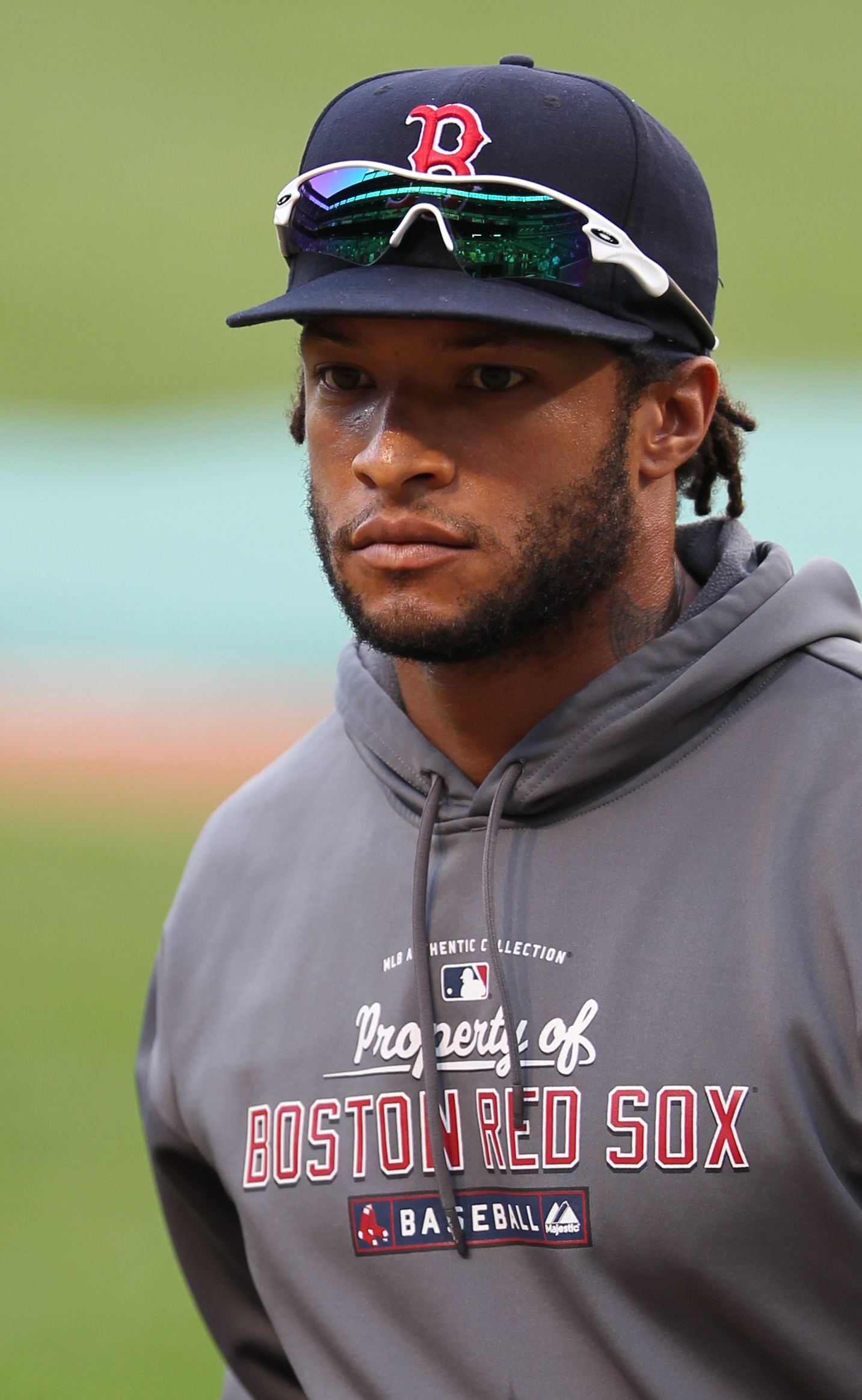 Darnell McDonald